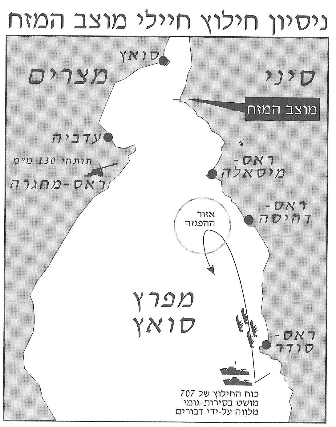 תרשים תנועתהכח לחילוץ אנשי מוצב המזח 11 באוקטובר 1973